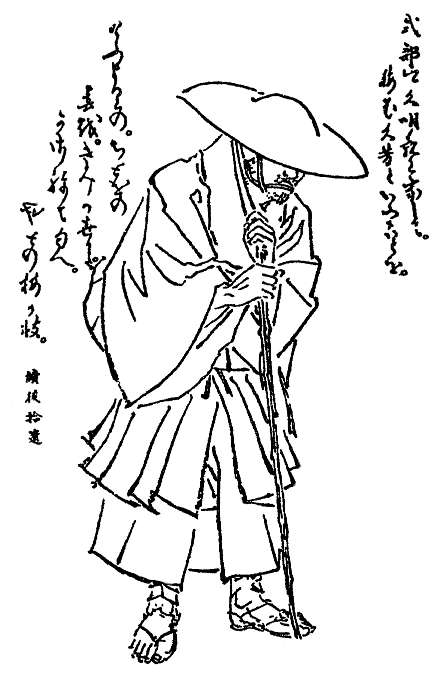 北条貞時。鎌倉幕府9代執権。／江戸時代『前賢故実』より。画：菊池容斎